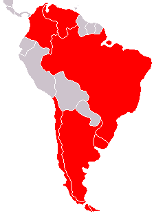 Paises participantes del Torneo Sudamericano de Básquetbol de 2008